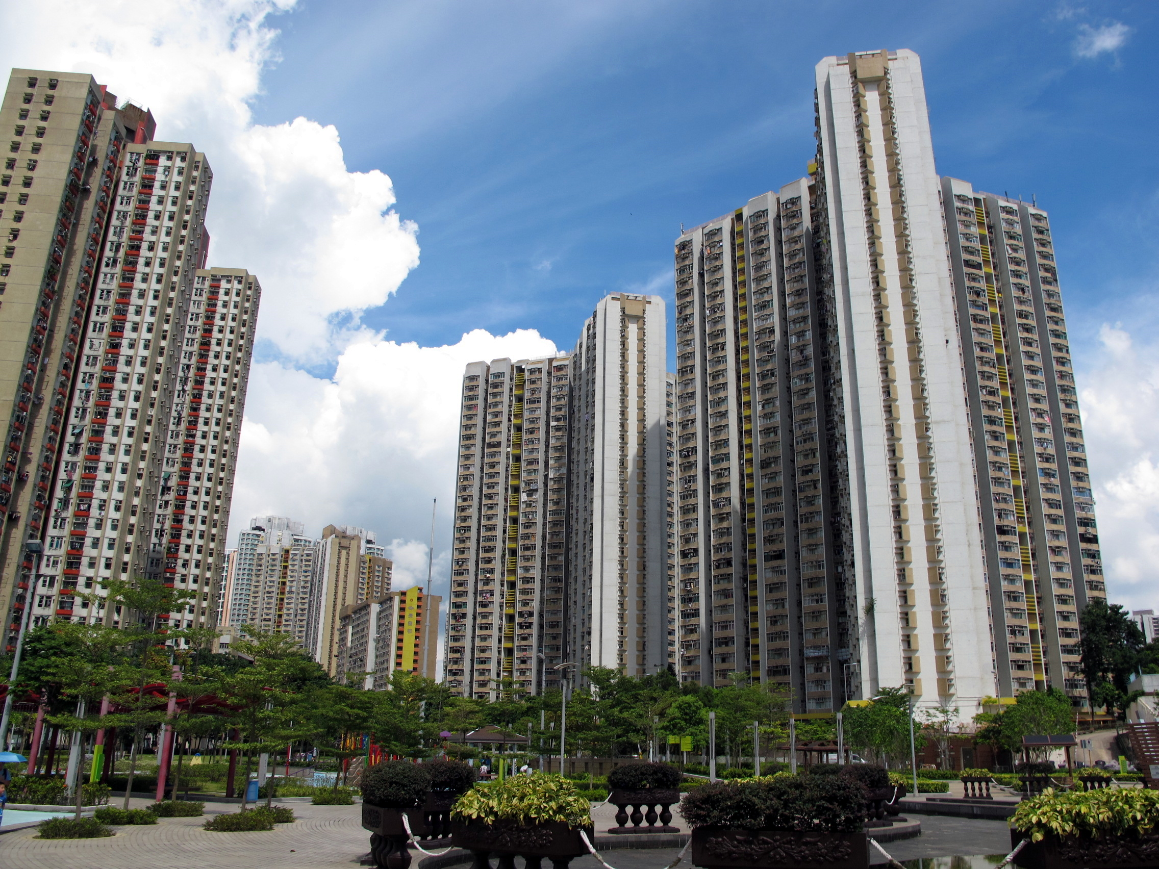 Cheung On Estate, Tsing Yi